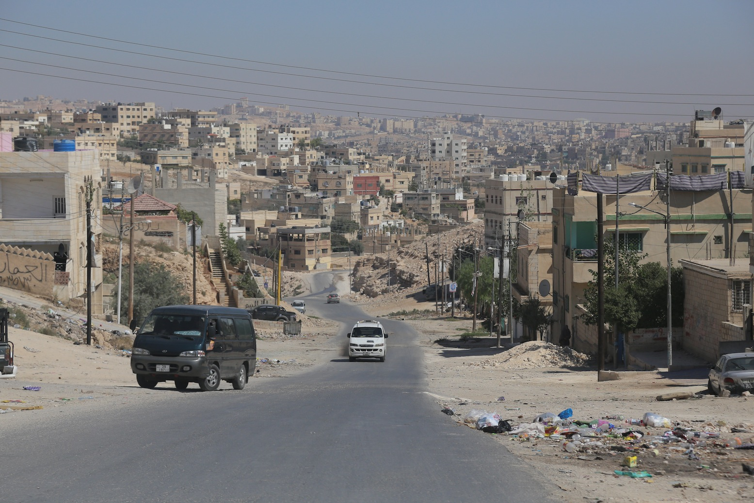 Al Amirah Rahmah, Az-Zarqa, Jordan